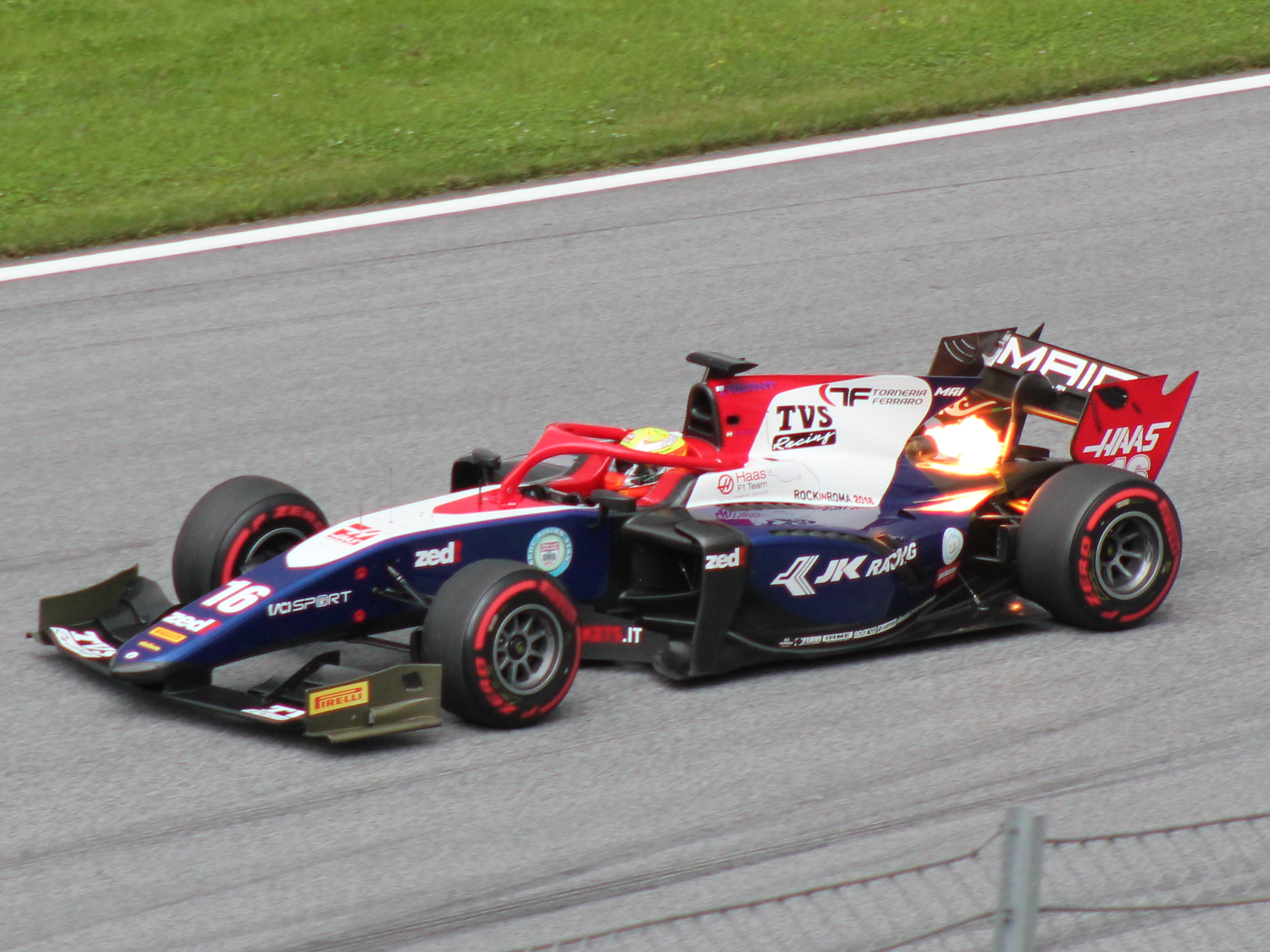 16 Arjun Maini beim Rennwochenende in Österreich 2018 (1)